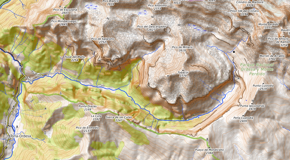 carte réalisée sur umap This map may be incomplete, and may contain errors. Don't rely solely on it for navigation.